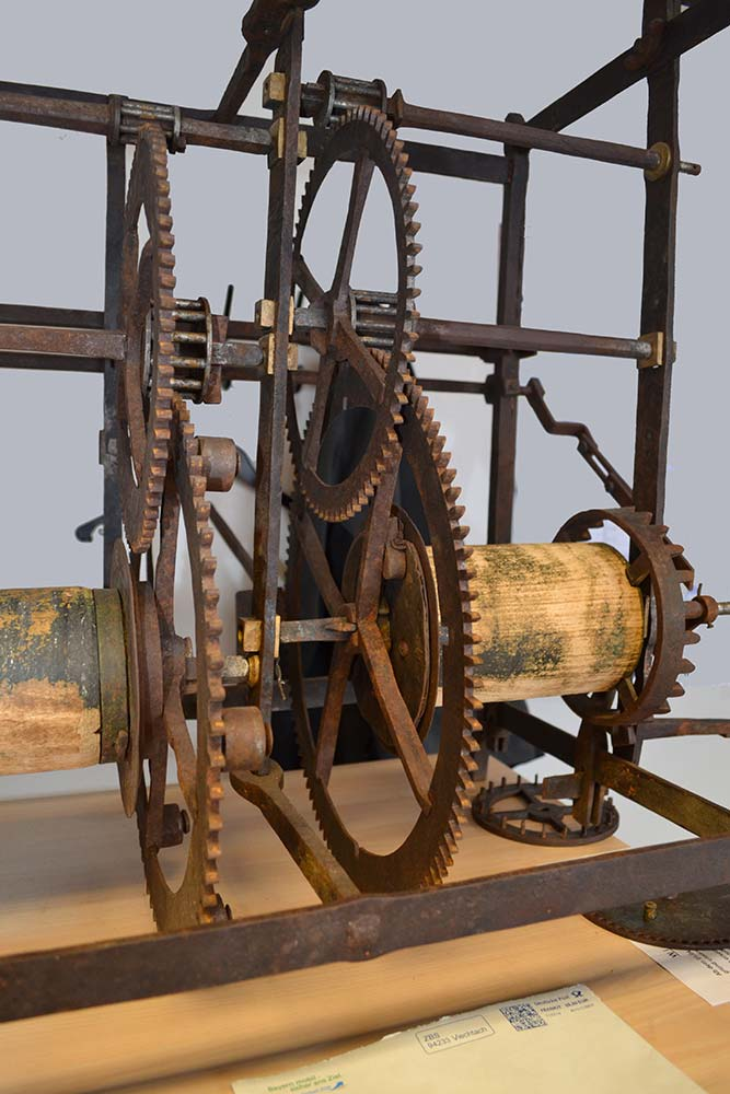 Ansicht der historischen Turmuhr von Forchtenberg